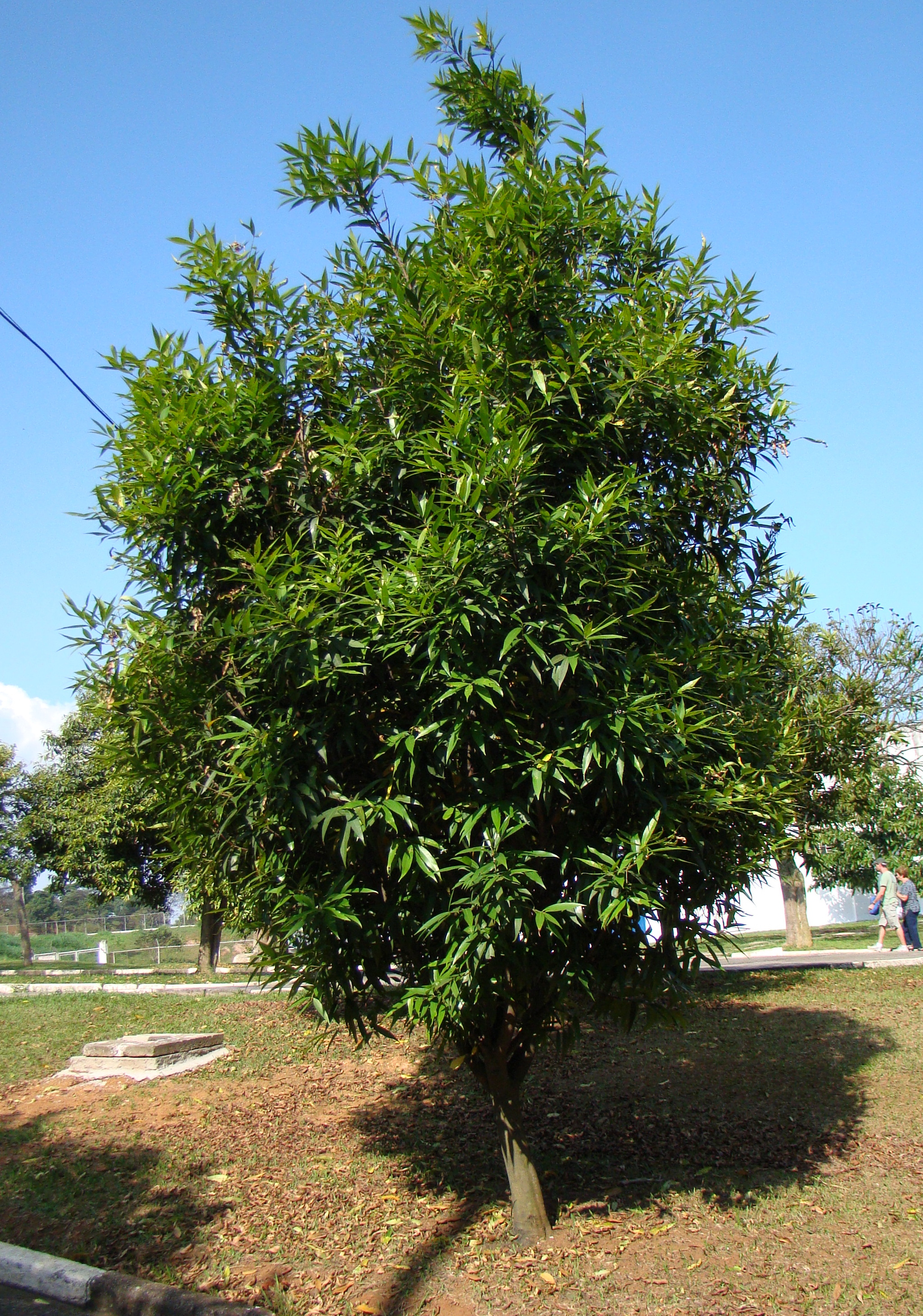 Syzygium jambos CERET s�O pAULO bRAZIL